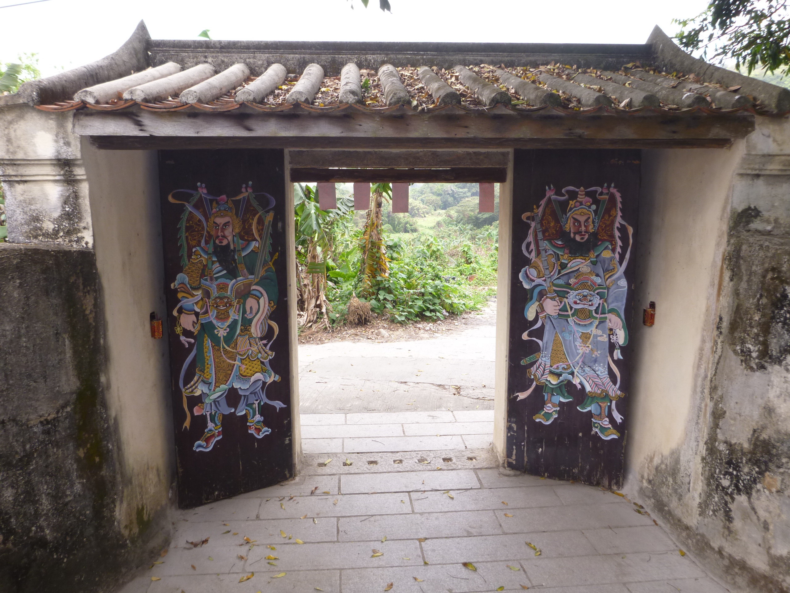 1750 年左右與圍村同時落成